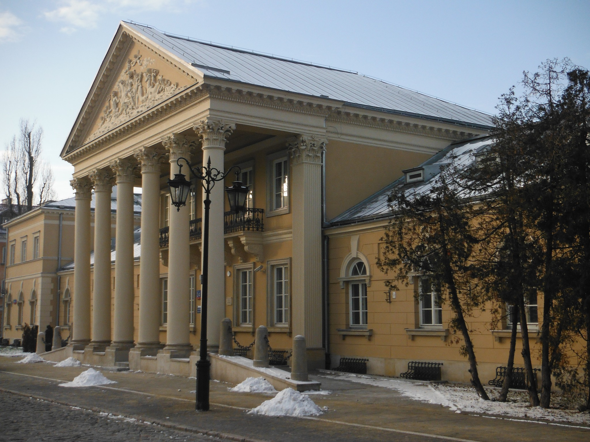 Dawna Łaźnia Teodozji Majewskiej przy ul. Bednarskiej 2/4 w Warszawie.